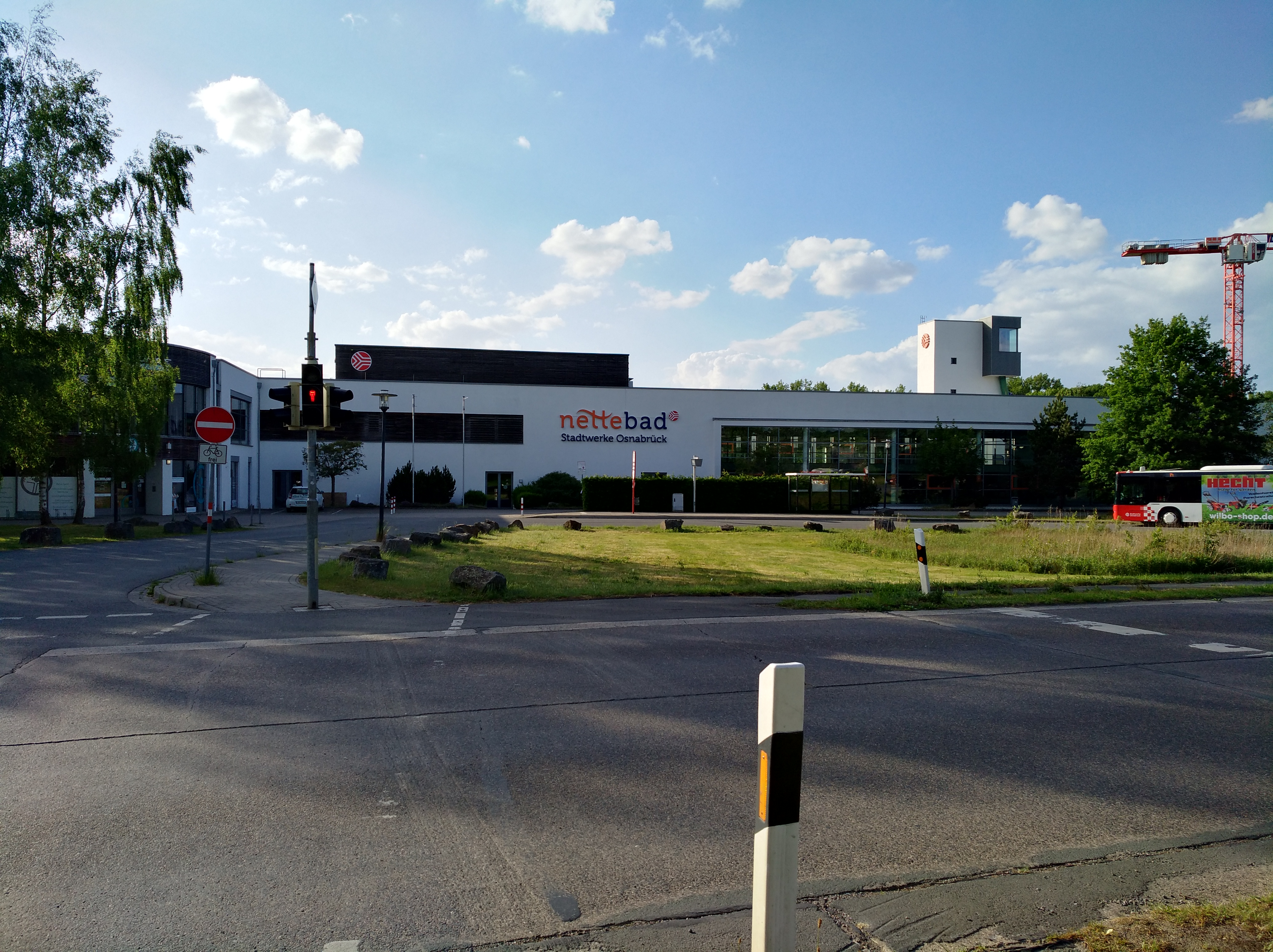 Nettebad Osnabrück, gesehen von der Vehrter Landstraße